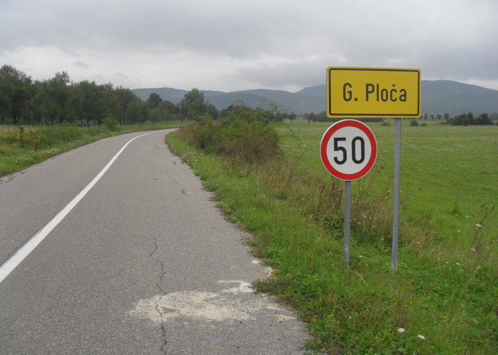 Табла на улазу у Горњу Плочу из правца Ловинца, Лика.